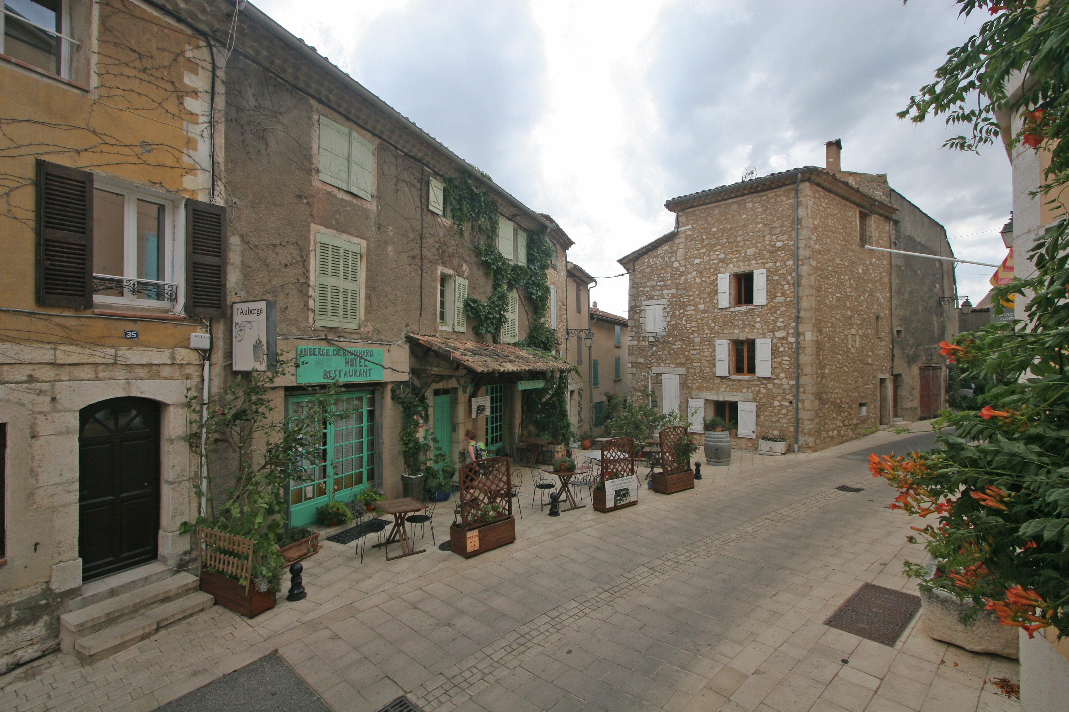 Aisles in Baudinard-sur-Verdon